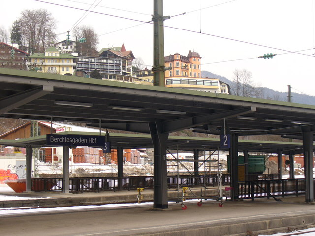 Berchtesgaden Hbf. (Berchtesgaden Main Station)